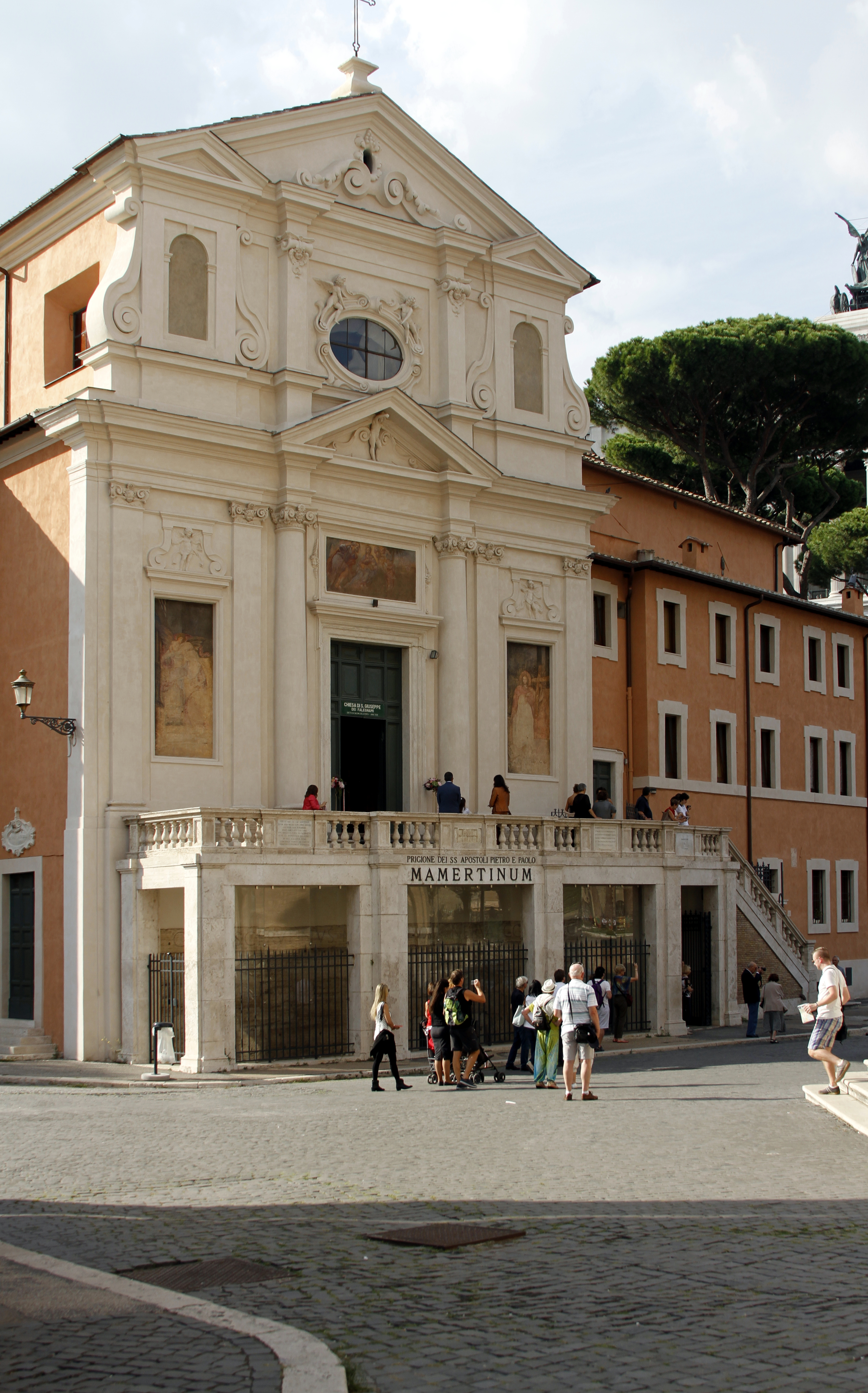 San Giuseppe dei Falegnani - Rome